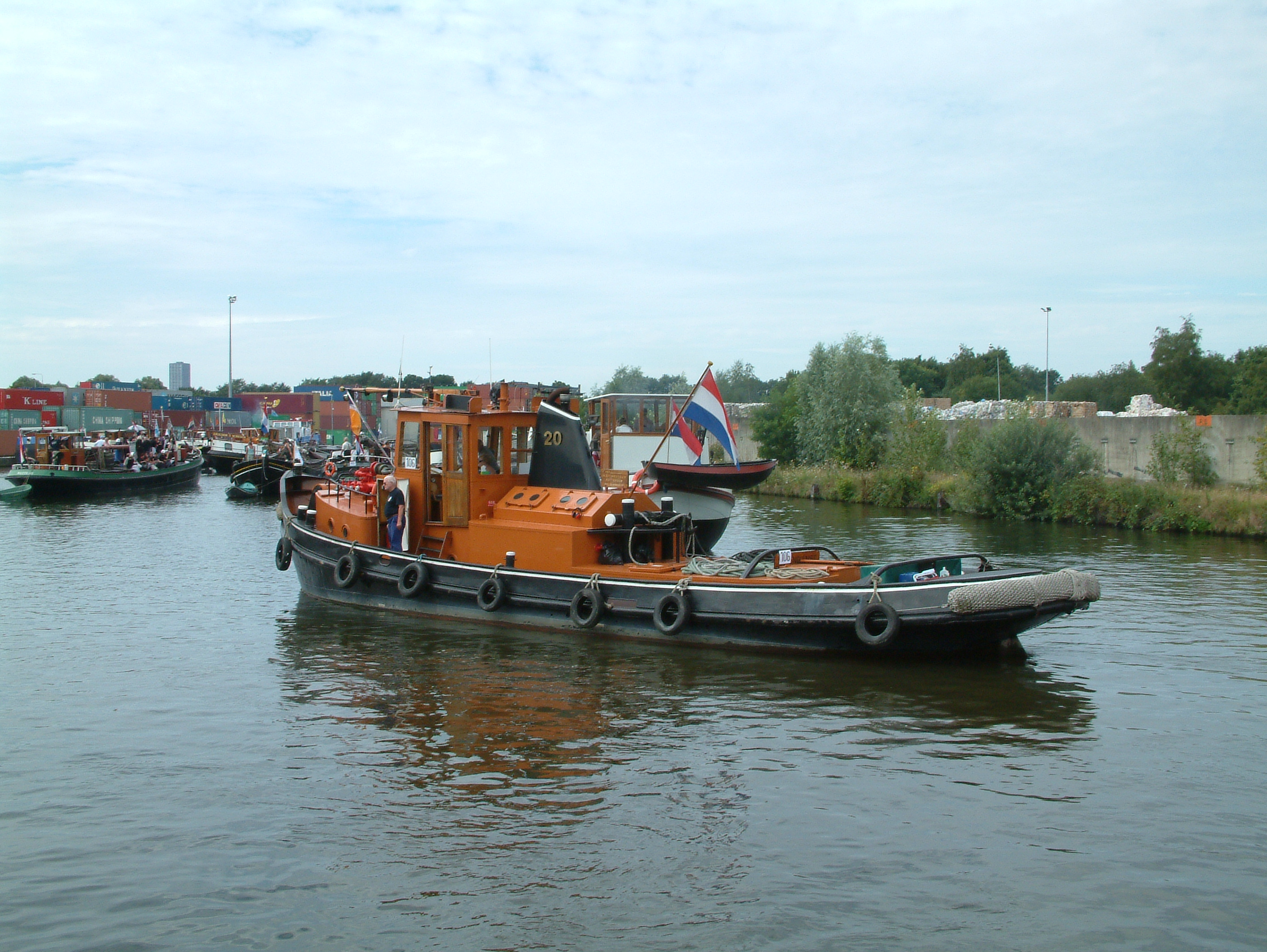 De Rotterdamse Havendienst 20 op de LVBHB reunie 2009 in Tilburg